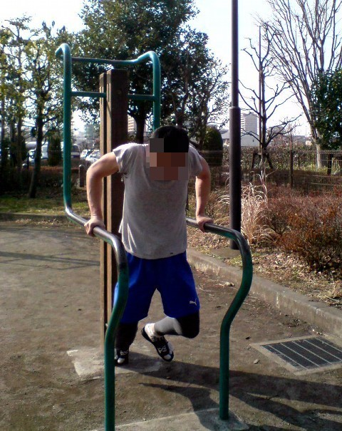 ディップス画像